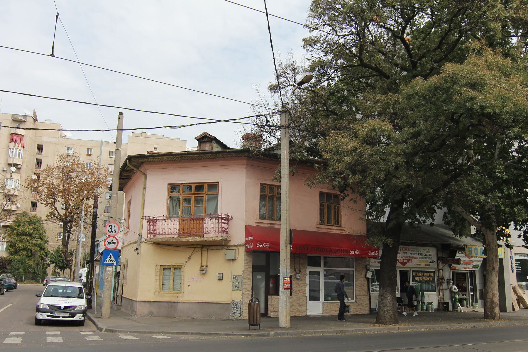 Casă pe Dudești